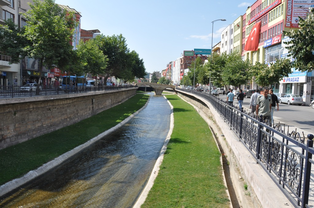 Kastamonu Cumhuriyet caddesi Karaçomak çayı Nasrullah köprüsü Ağustos 2011